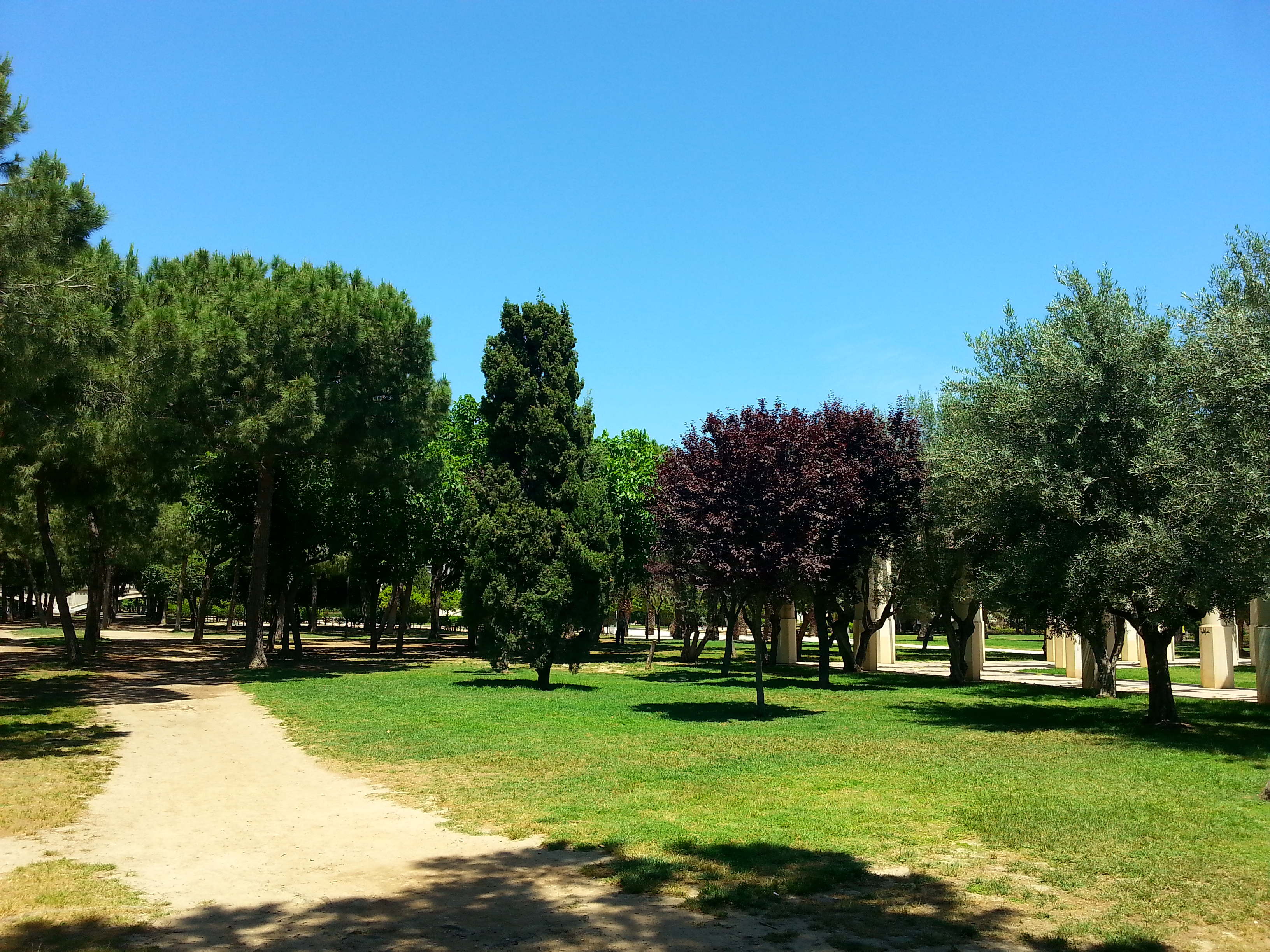 Tramo XI del Jardín del Turia, Valencia.